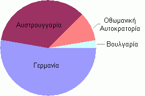 Aπώλειες των Κεντρικών Δυνάμεων στον Α' Παγκόσμιο Πόλεμο Άδεια χρήσης Το παραπάνω αρχείο διανέμεται υπό τις δύο παρακάτω άδειες χρήσης. Μπορείτε να επιλέξετε την άδεια της προτίμησής σας.